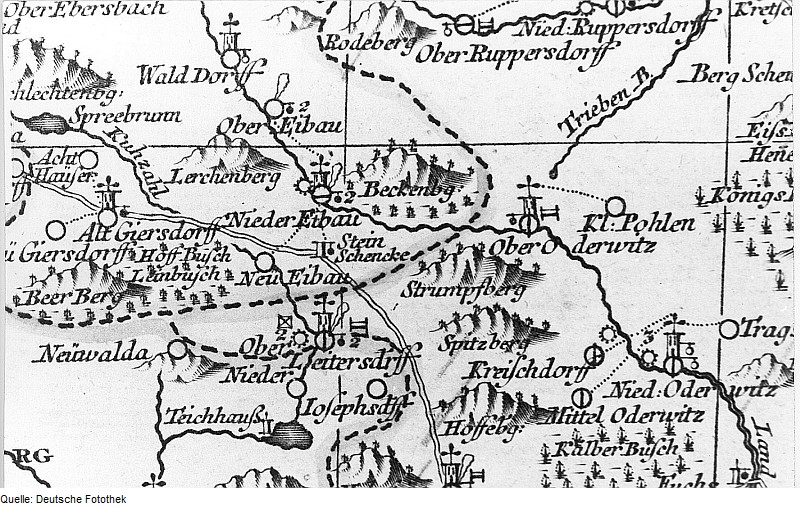 Original image description from the Deutsche Fotothek Eibau. Oberlausitzkarte, Schenk, 1759